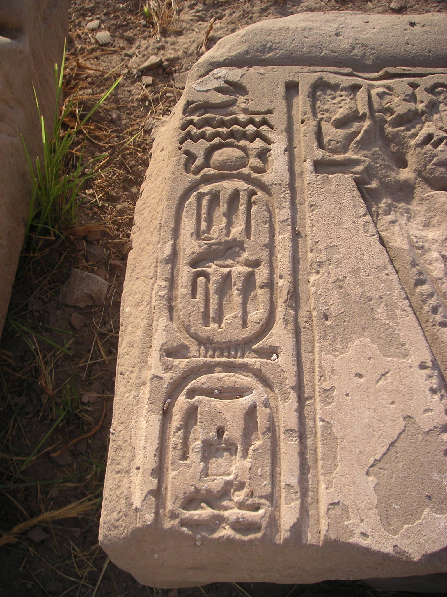 Bloc inscrit aux noms de César Tibère - Medamoud